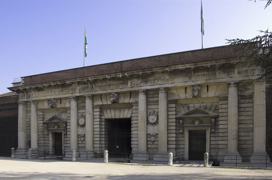 Porta Palio a Verona vista dall'esterno